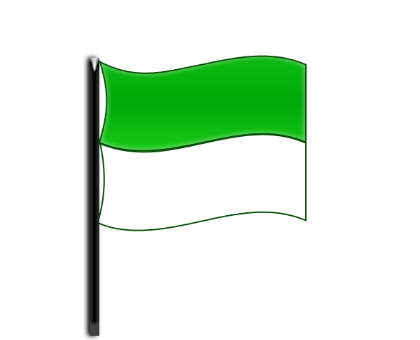 Bandera Oficial de llallagua mas su mastil, ya q' la primera version no contaba con su mastil